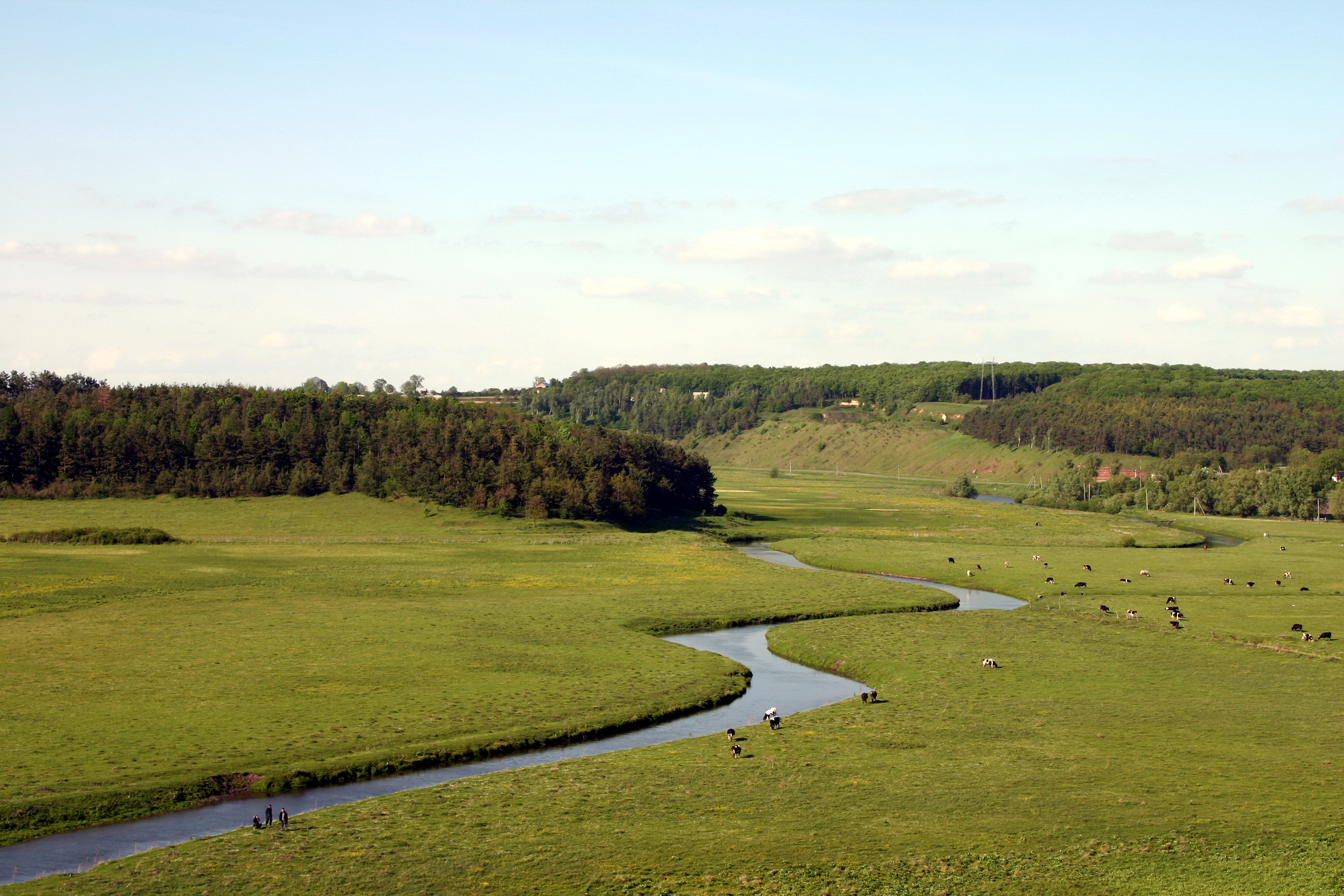 R._Gnizna_in_Bavoriv.jpg: р. Гнізна поблизу с. Баворів